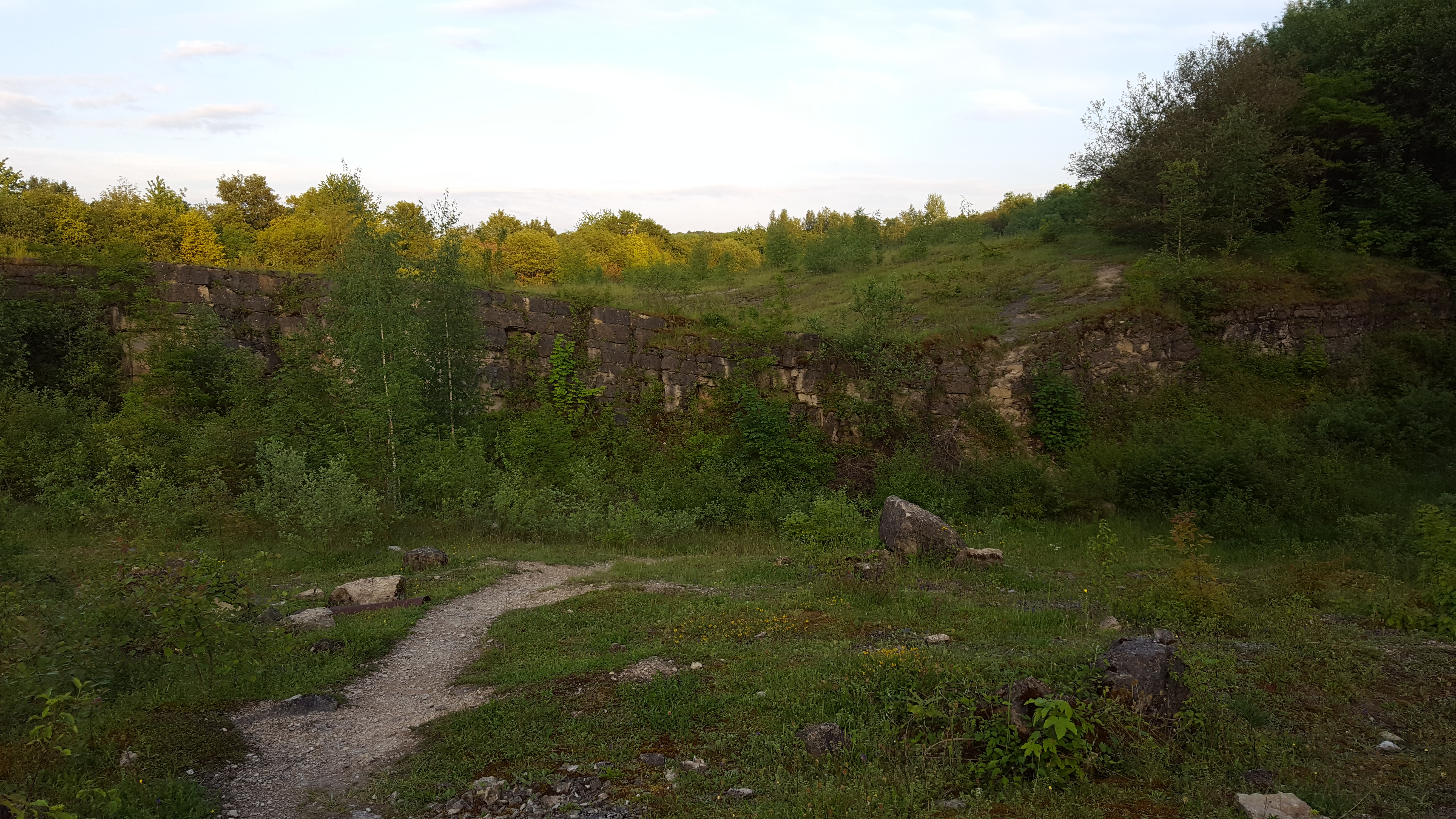 Stillgelegter Kalksteinbruch im Naturschutzgebiet Birzberg NSG 26, Abbaukante des Tagebaus, ehemaliger Meeresboden, Muschelkalkboden